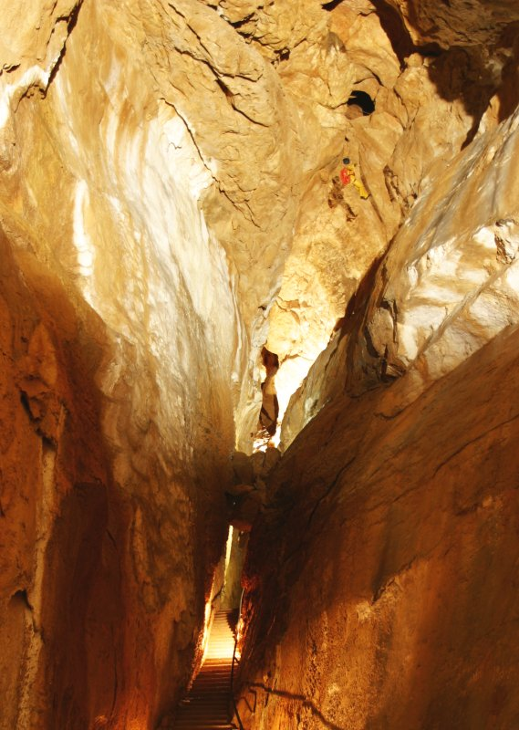 Dachstein-Mammuthöhle, selbst fotografiert, gemeinfrei